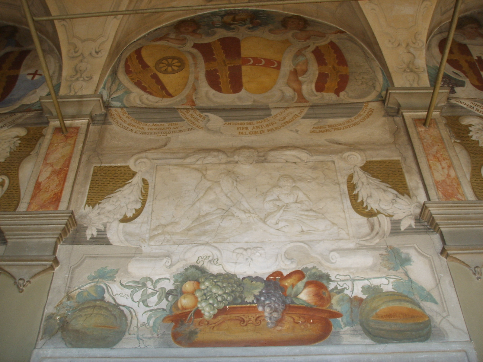 Palazzo_di_San_Clemente,_ frescoes in the loggetta in Florence